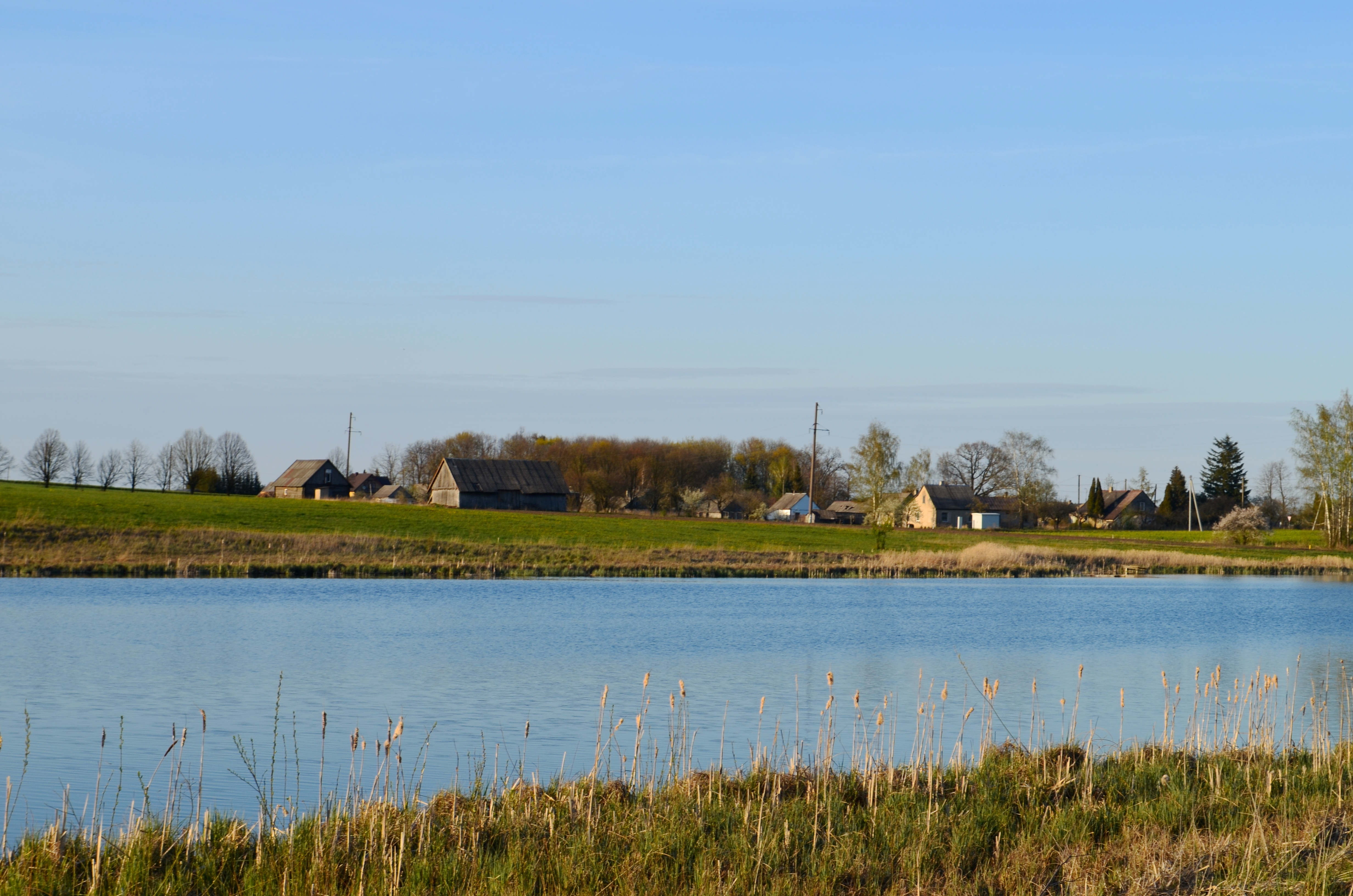 Jaugilių ežeras ir kaimas, Kėdainių raj.